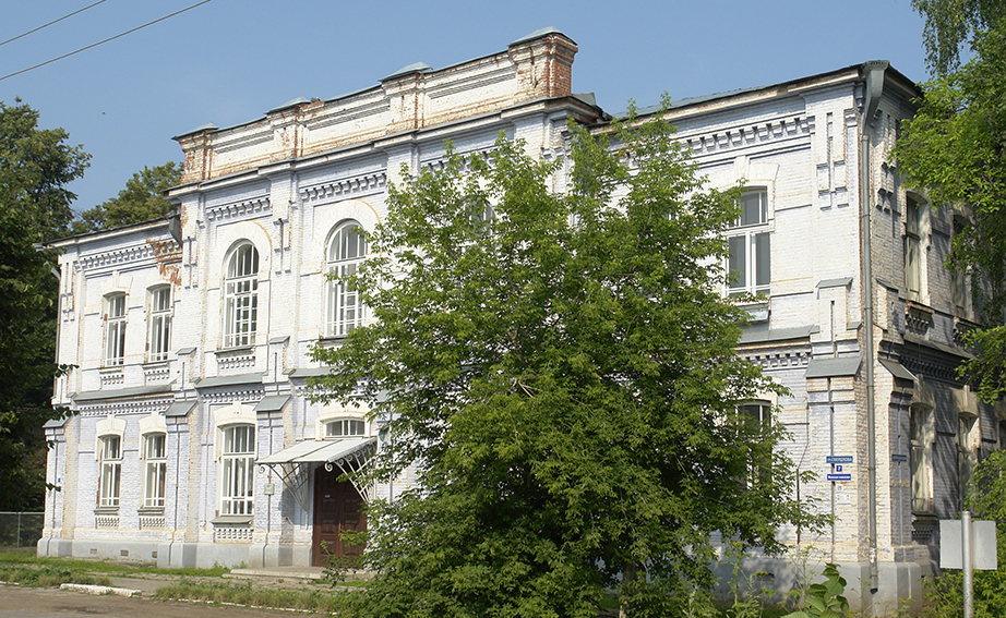 Здание Осинского профессионально-педагогического колледжа (бывшее здание женской гимназии). г. Оса (Пермский край). Замечательный образец осинской архитектуры начала ХХ века. Его можно полноправно отнести к числу наиболее выразительных памятников города. Двухэтажное кирпичное здание построено в 1906 году в стиле модерн. Строительство велось под руководством особого строительного комитета, членов земской управы и инженера Власова.